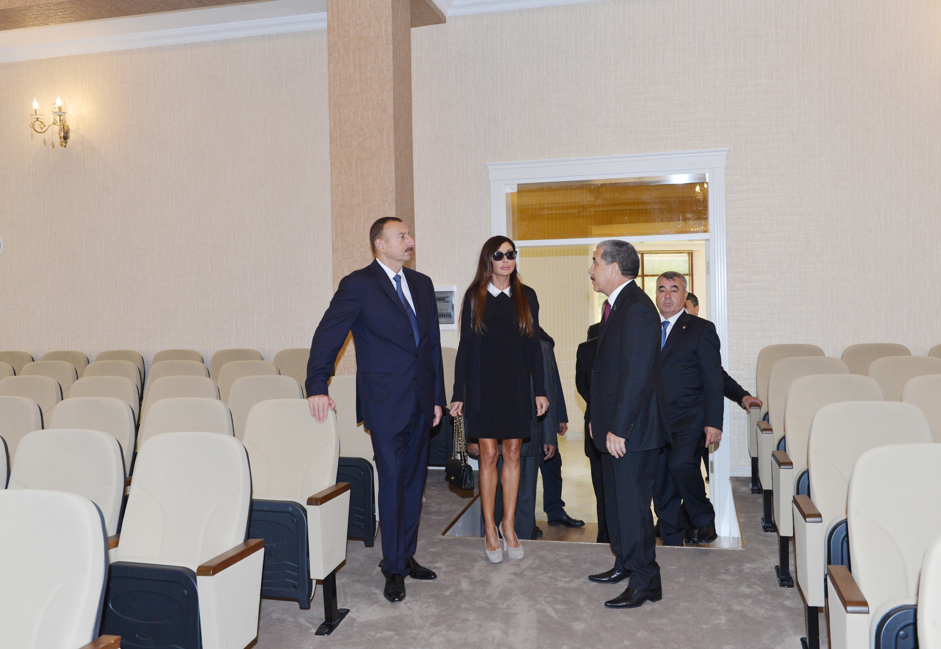 İlham Əliyev Qubada Azərbaycan Dövlət İqtisad Universitetinin kompleksinin açılışında